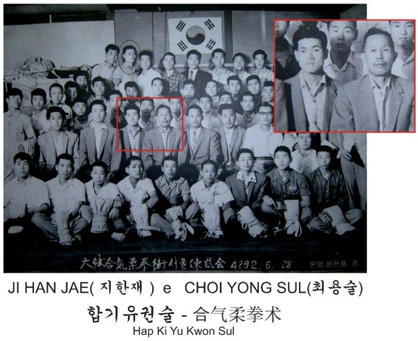 Photo historique !